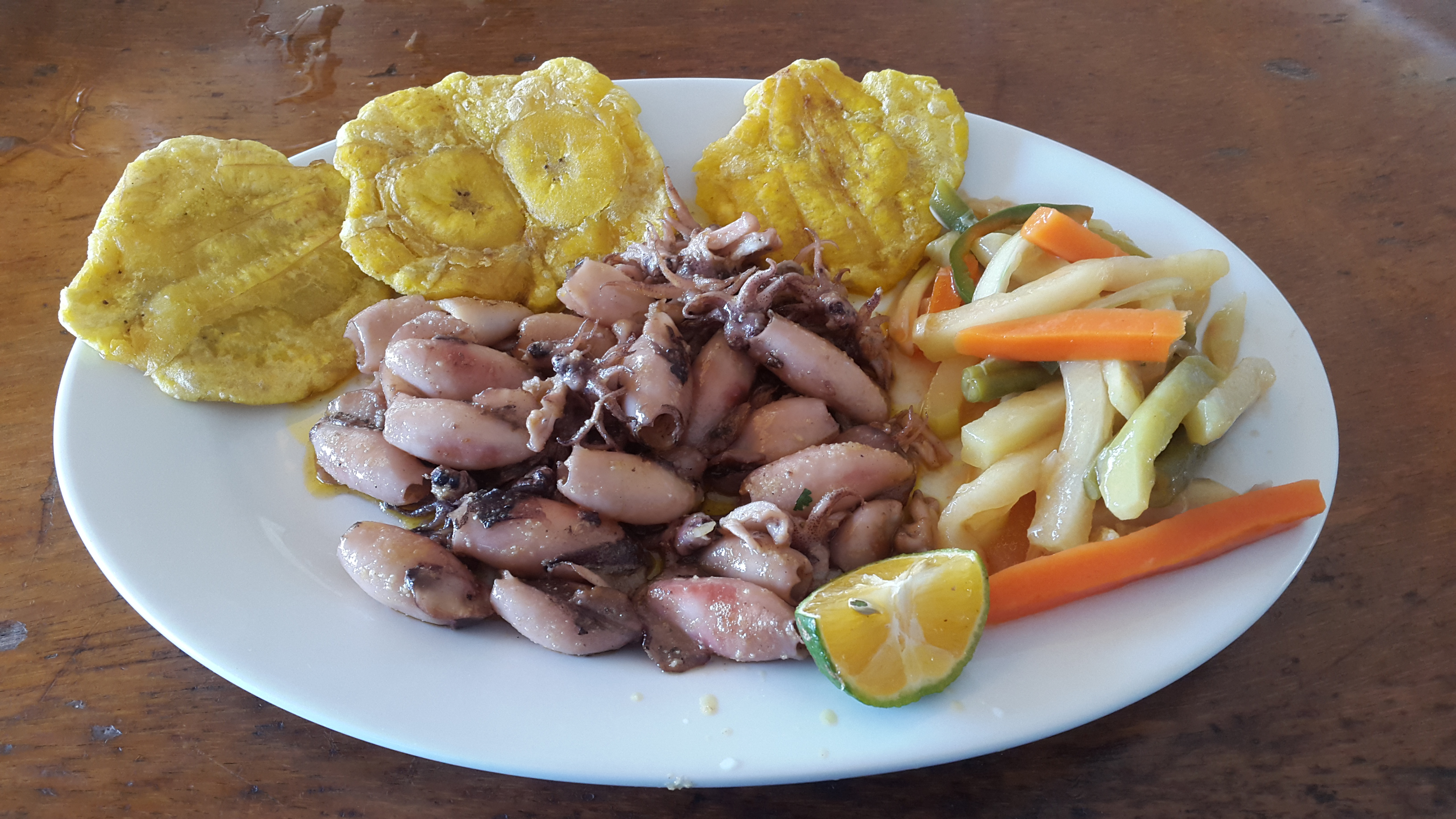 Calamar torpedo al ajillo servido con patacones y escabeche, Puntarenas, Costa Rica.